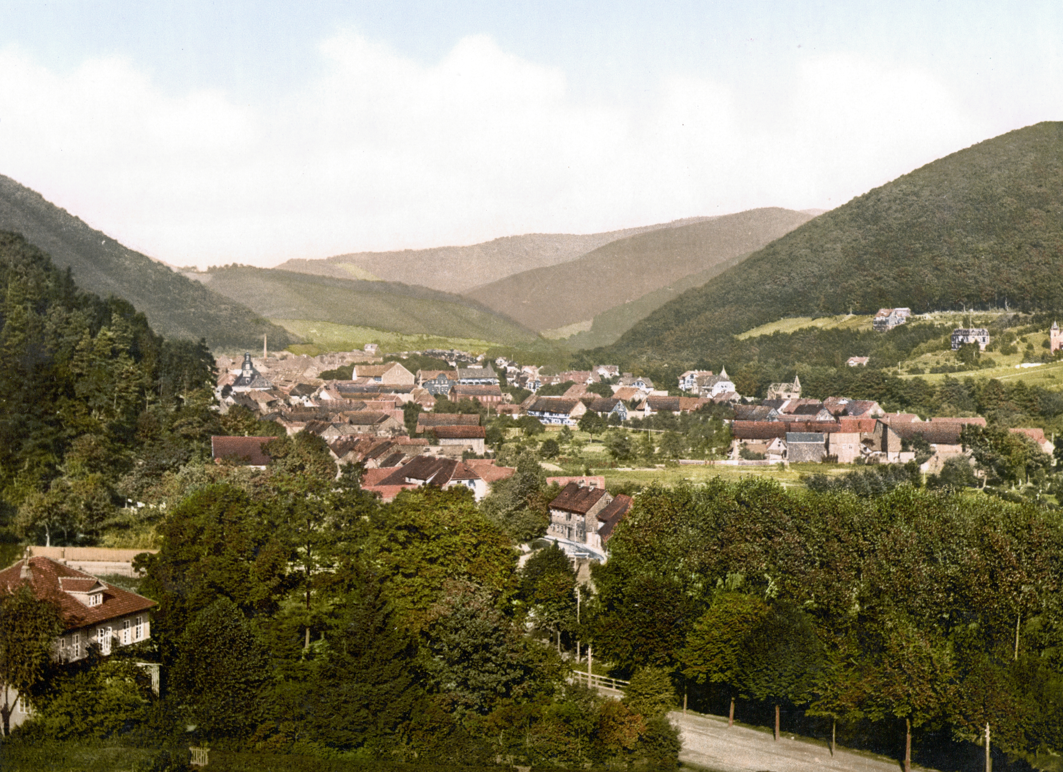 Bad Lauterberg